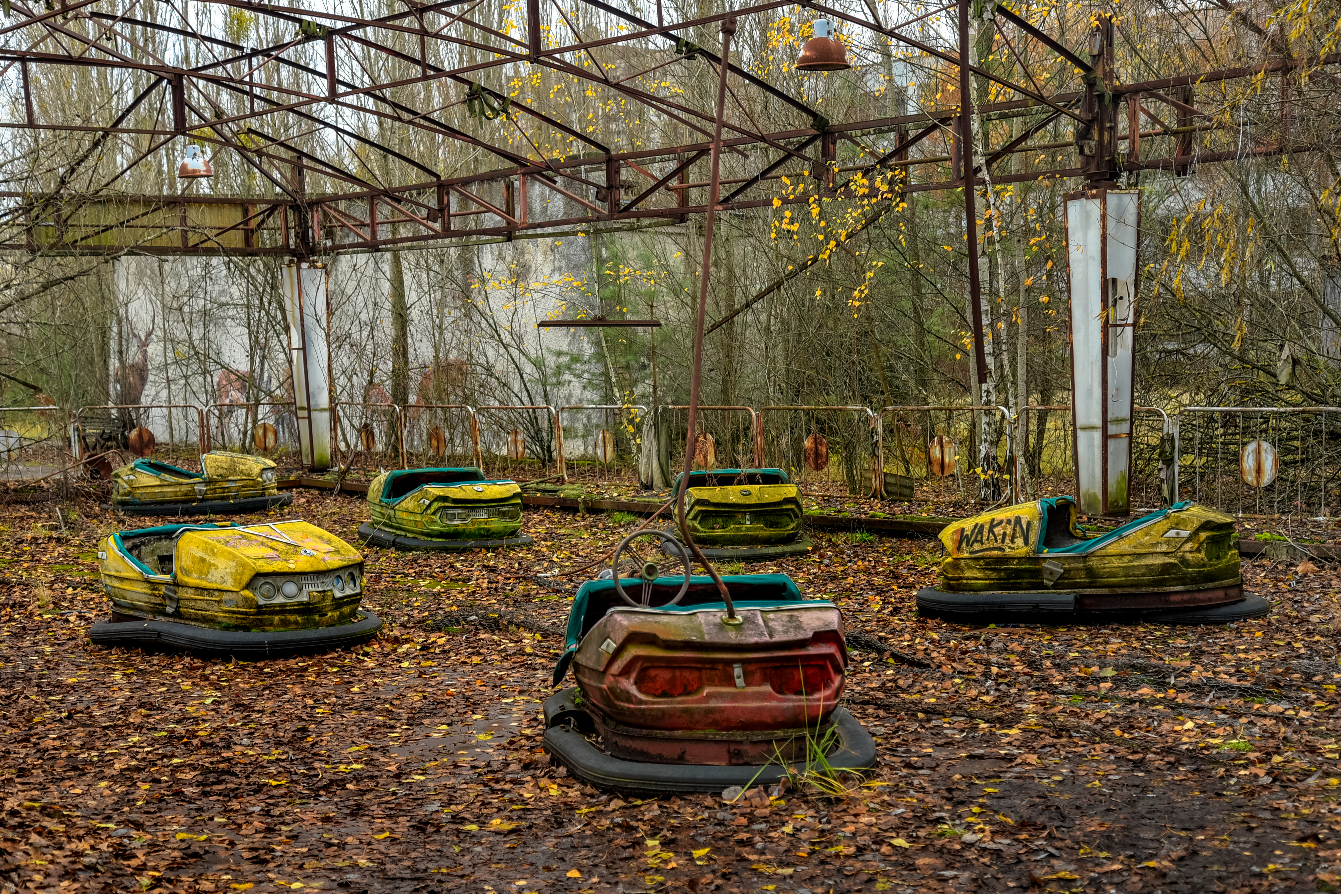 Pripyat (Ukraine)